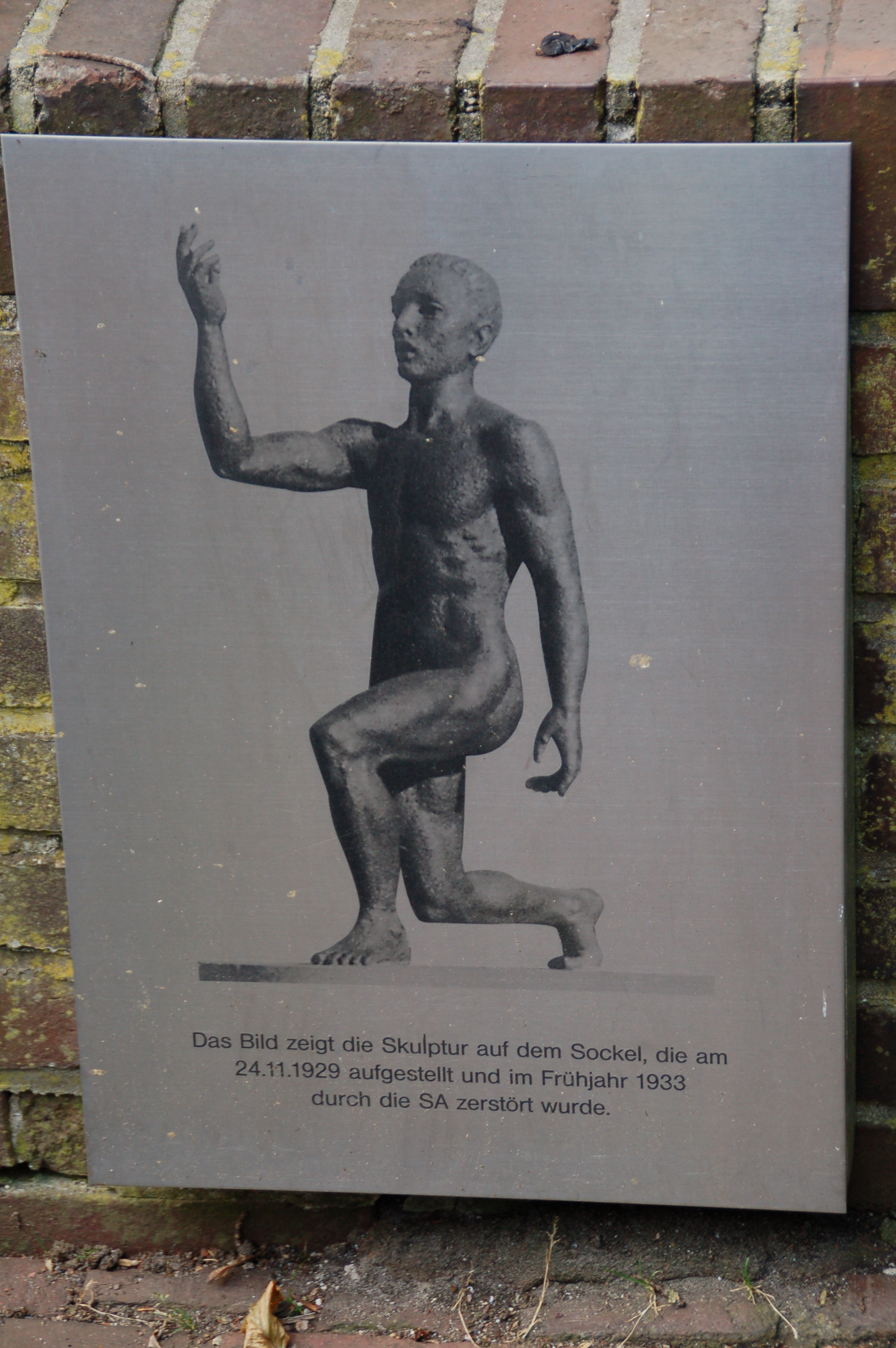 Schwarzer Garten in Nordhorn